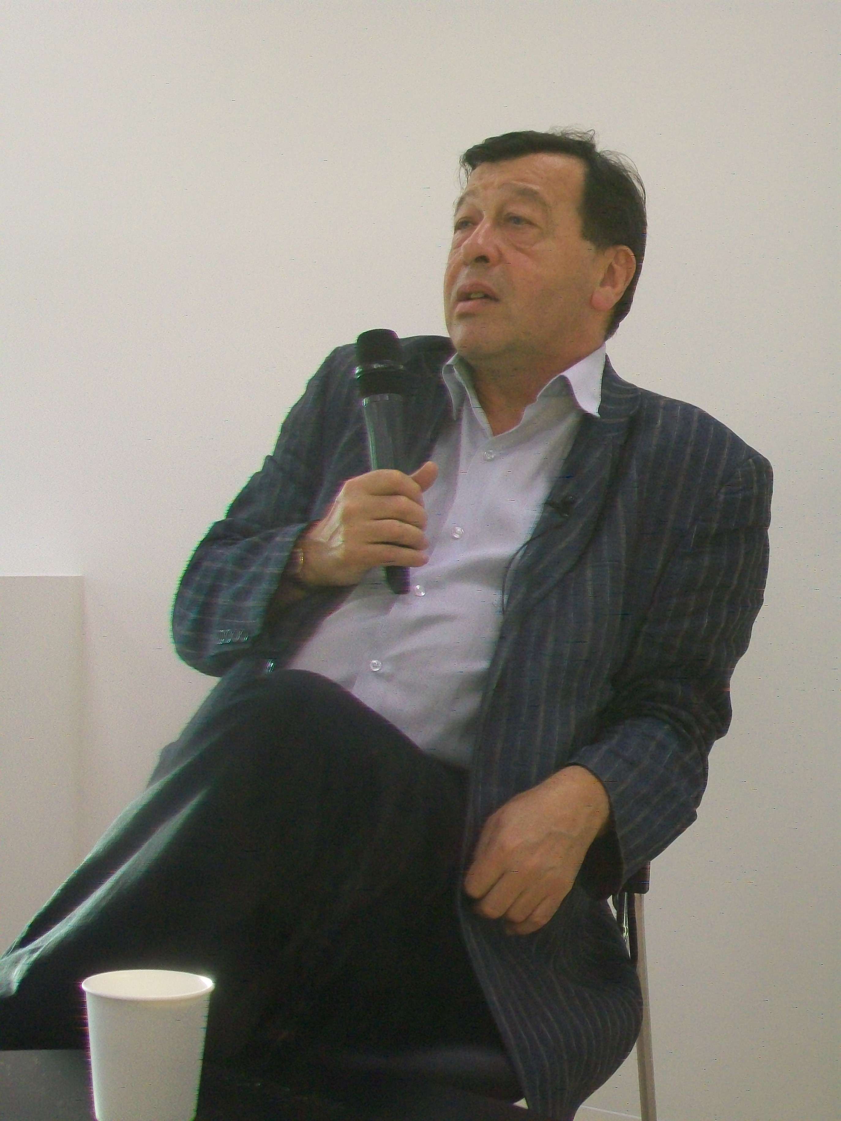 Евгений Шлемович Гонтмахер в Ельцин-центре. 22 июня 2018 года